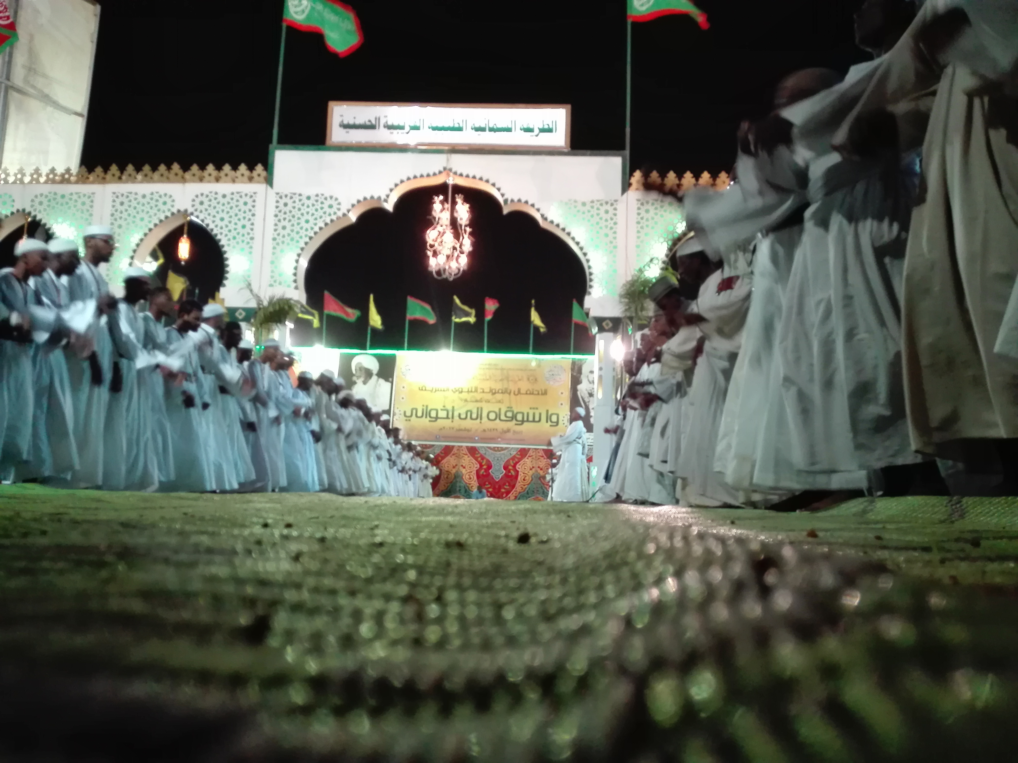 اداء الذكر للطريقه السمانية بالخرطوم المولد النبوي الشريف و مدح المصطفى صل الله عليه وسلم This is an image with the theme "Africa on the Move or Transport" from: Sudan